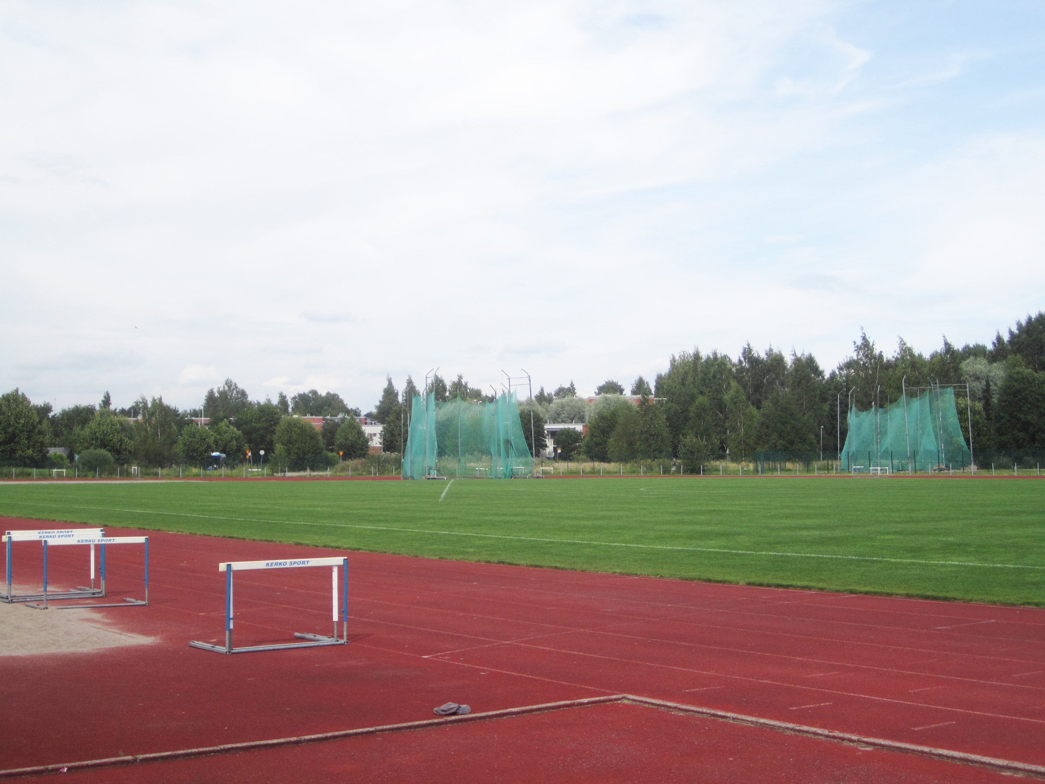 Pukinmäen liikuntapuisto Helsingissä